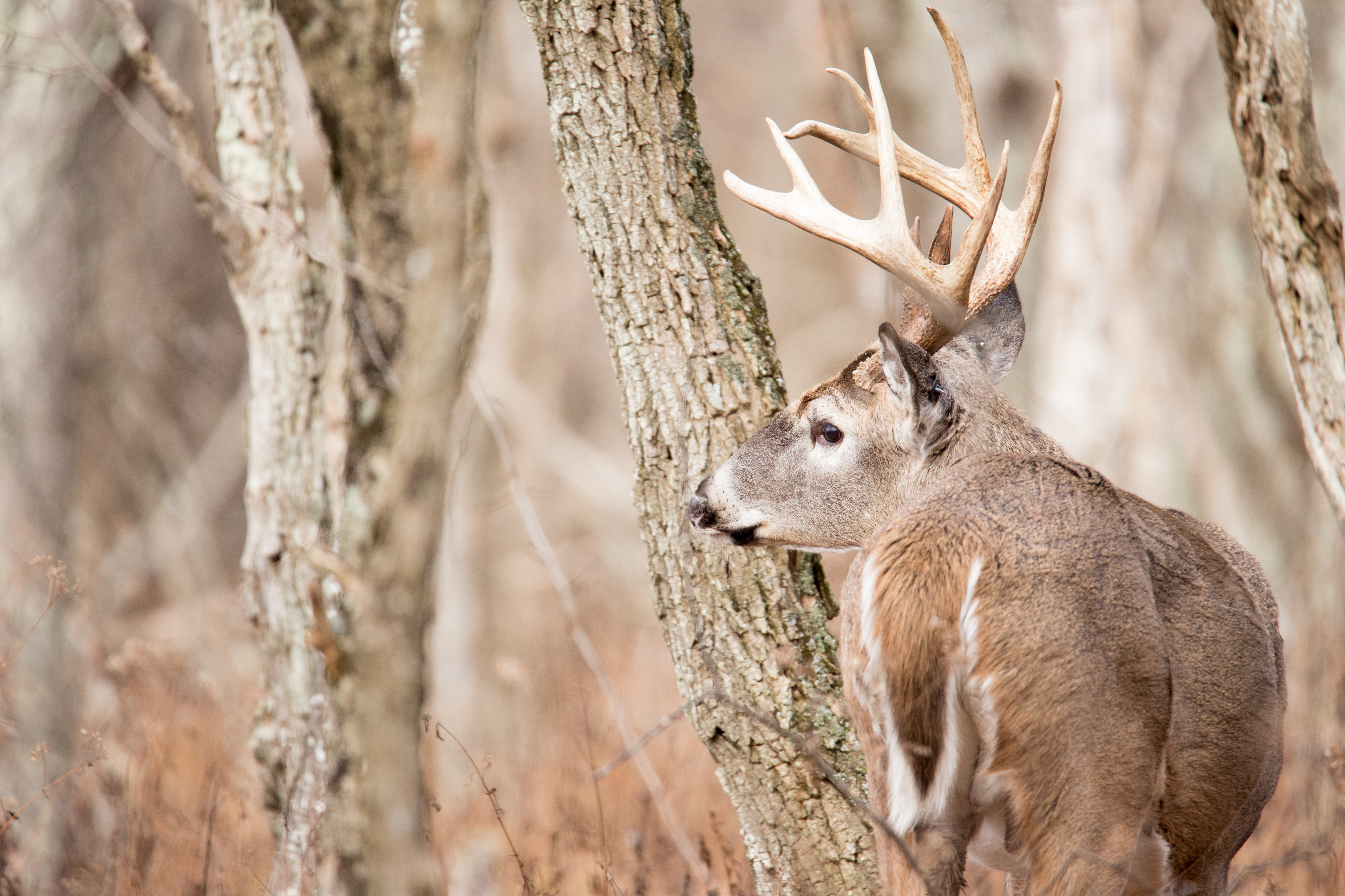 NPS | Katy Cain